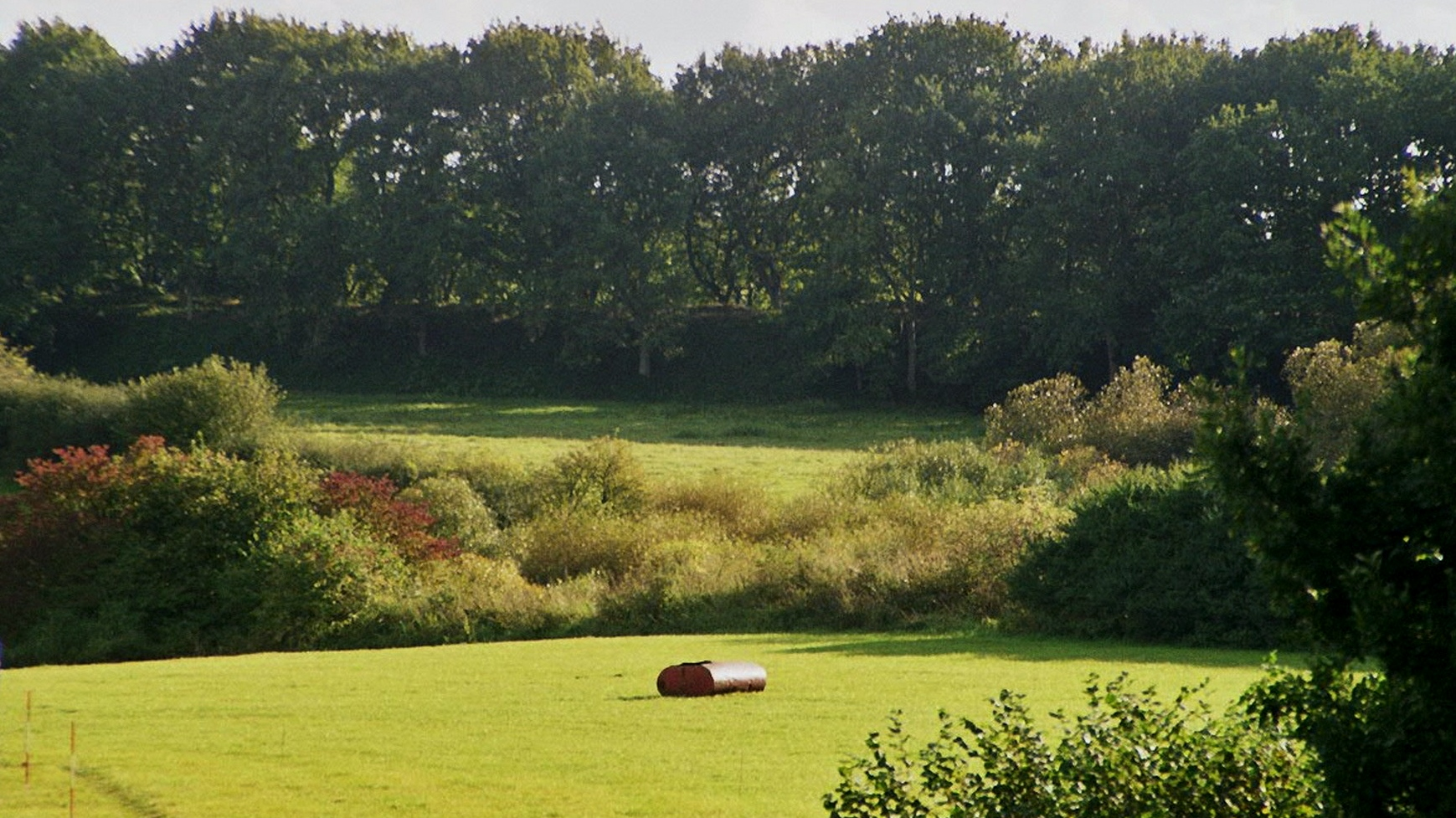 Source: made by WikiTour 2005 Description: (de:) Haithabu - Blick vom Halbkreiswall auf die gegenüberliegenden Teile der Anlage; die Bäume auf dem Wall lassen seine Mächtigkeit erahnen.